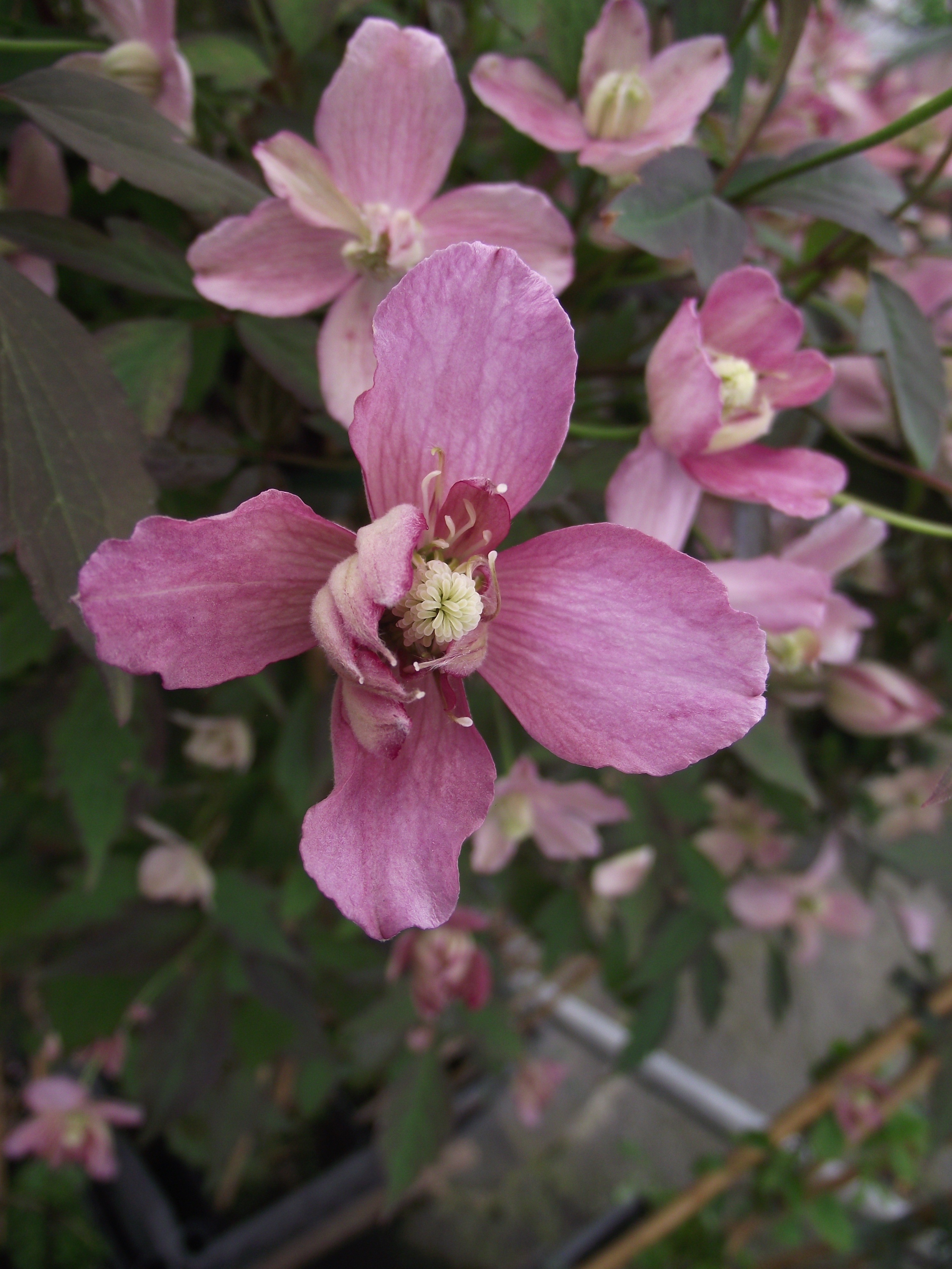 Clématite montana 'Sunrise'